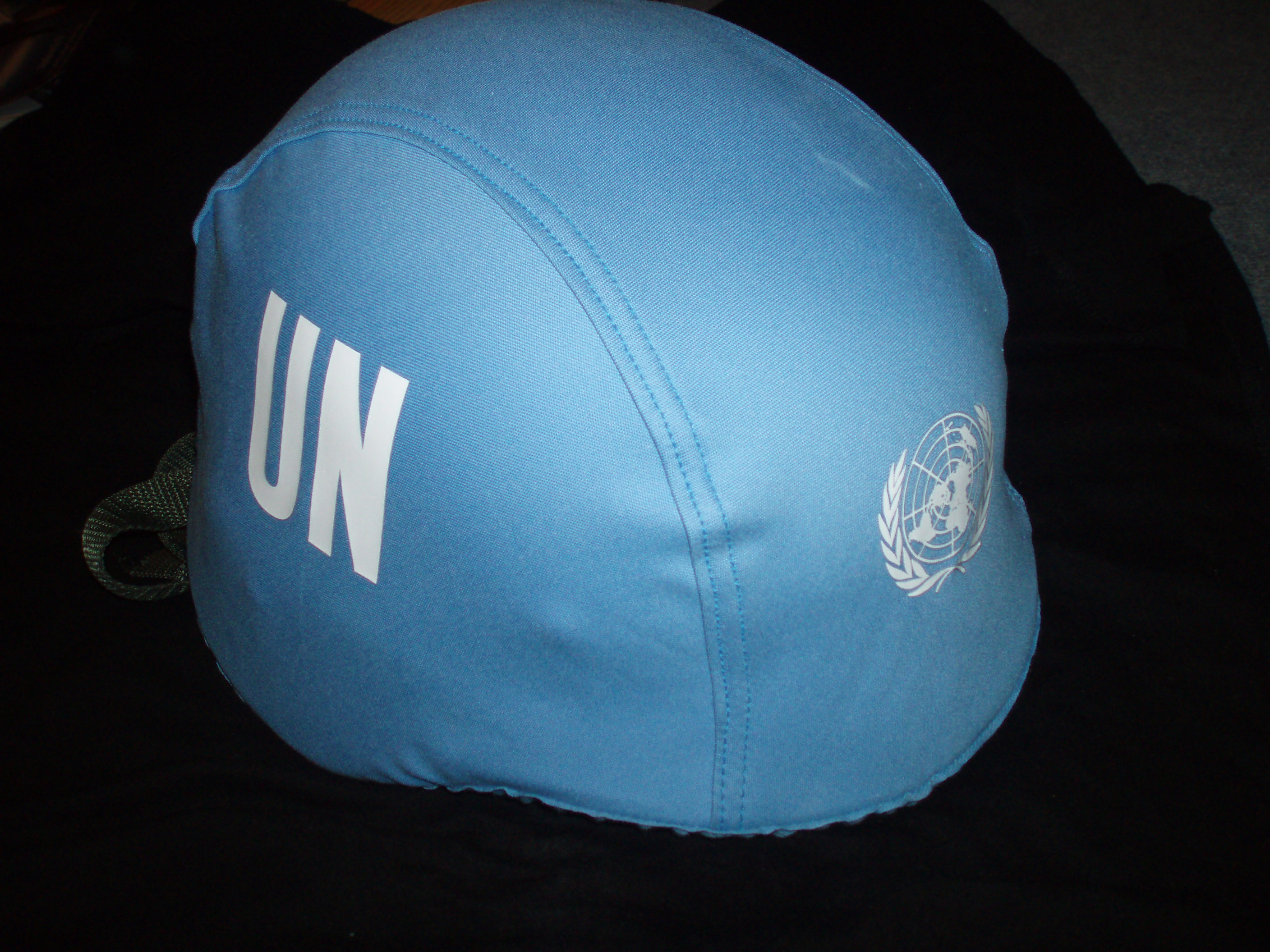 Přílba s modrým potahem příslušníků mírových sil OSN. The UN Peacekeepers force´s helmet